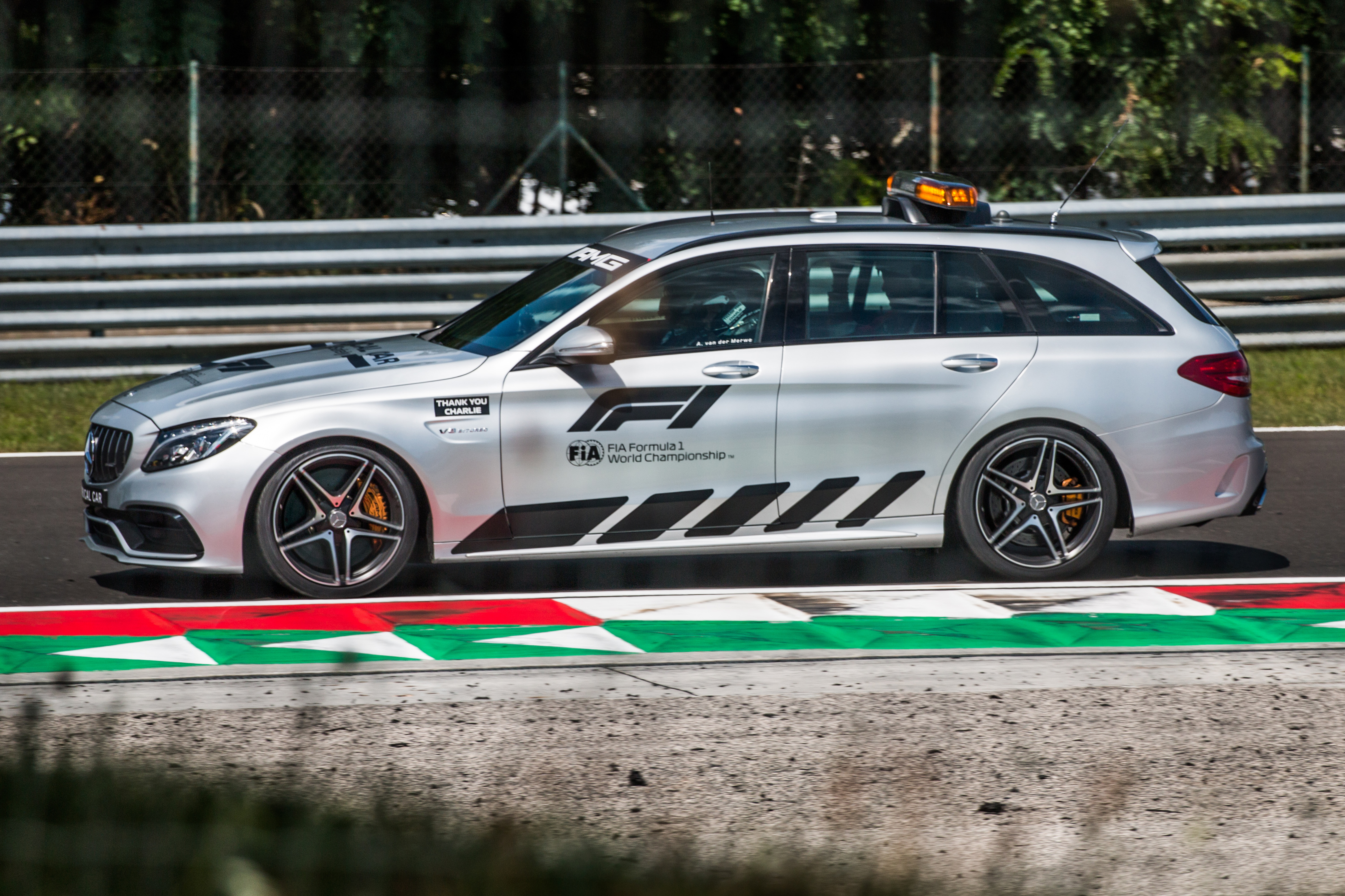 Alan van der Merwe driving Formula 1 Mercedes C63 S Estate during Hungarian GP 2019